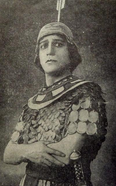 Vajo Sarajishvili as Radames, Aida (opera), Giuseppe Verdi